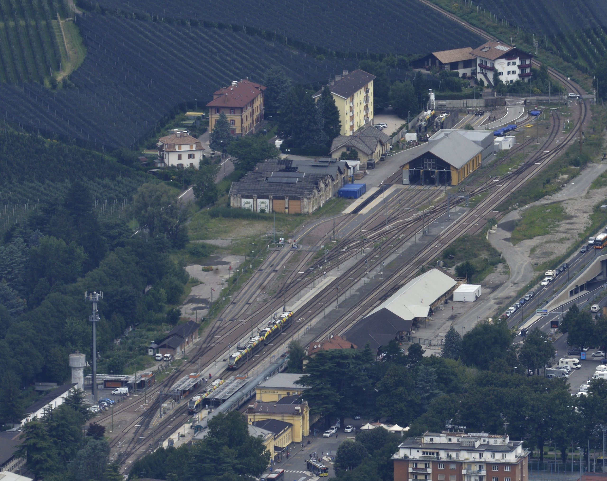 Bahnhof Meran, Gleisvorfeld, Blick von Hafling